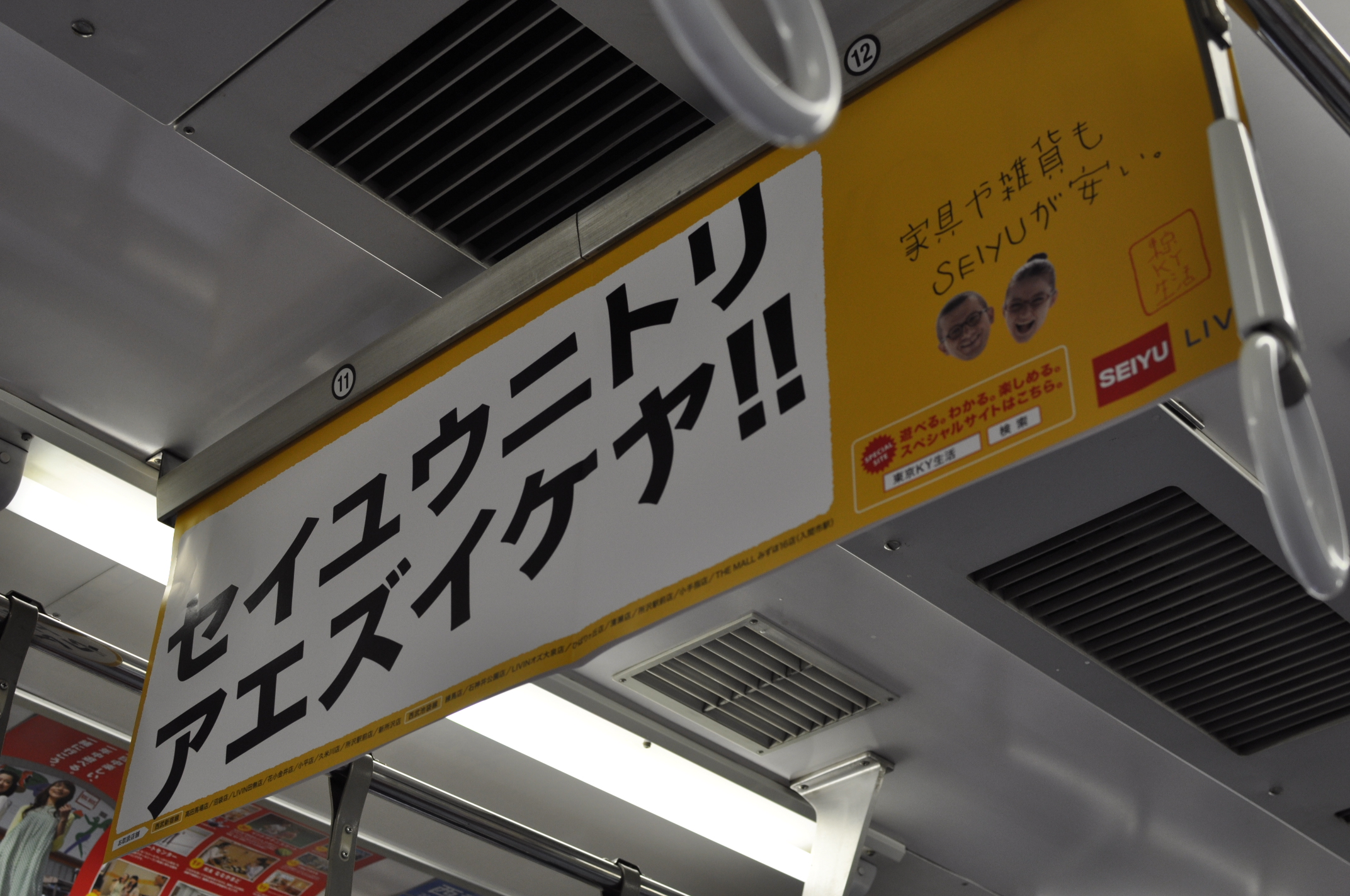 セイユウニトリ／アエズイケヤ